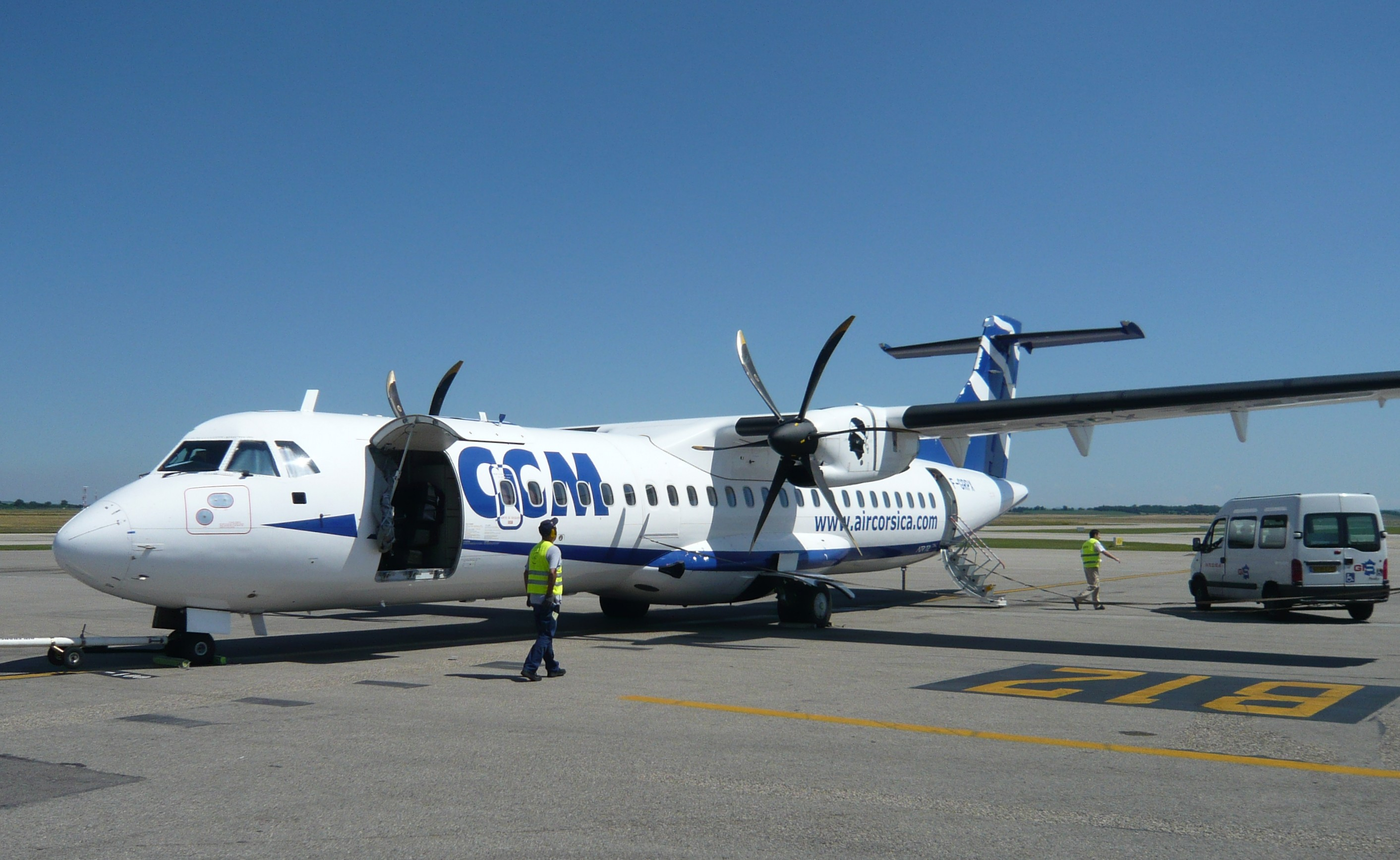 Eine ATR 72 der CCM